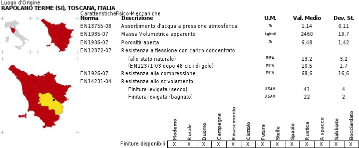 Scheda Tecnica della Pietra di Rapolano in selezioni Chiare